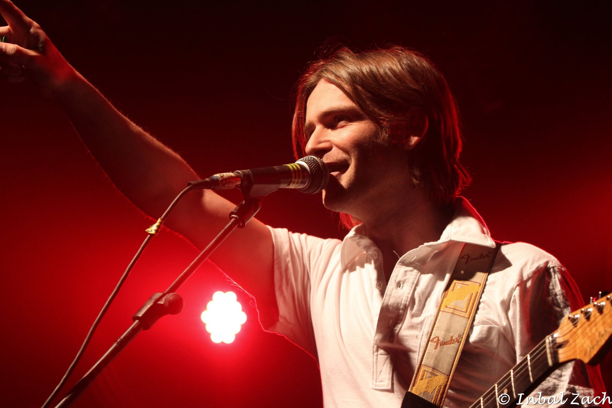 פיטר רוט בהופעה חיה